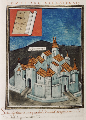 Abbildung aus der Notitia Dignitatum (Oxford (Bodleian Library, Ms. Canon. Misc. lat. 378), entstanden um 1440): Die symbolische Darstellung des Castrum Argentoratum im Kapitel des Comes tractus Argentoratensis als Zeichen seiner Zuständigkeit für den Grenzabschnitt des Rheinlimes bei Argentorate/Straßburg.